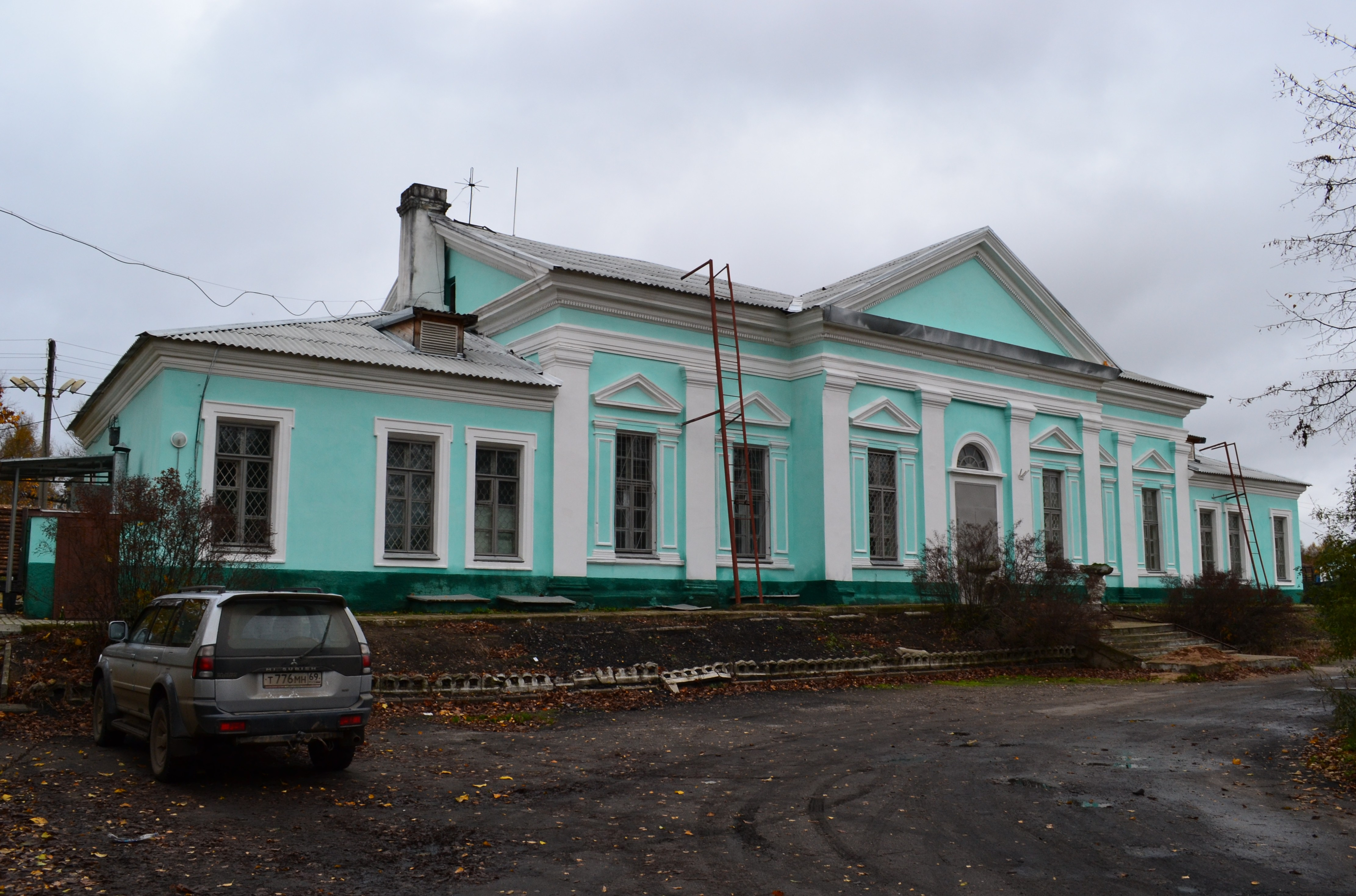 вокзал